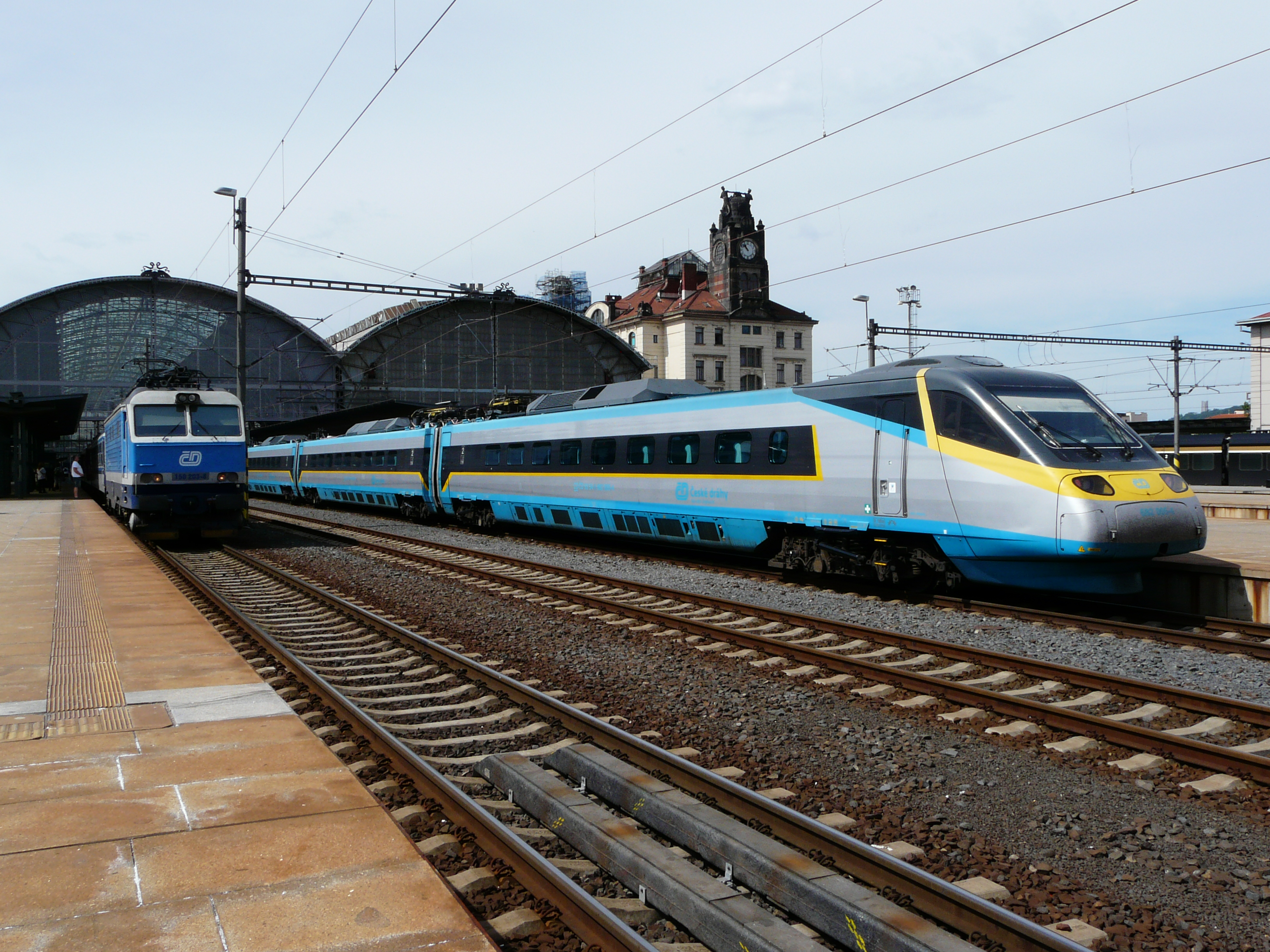 Ein Rychlík und ein SuperCity in Praha hlavní nádraží